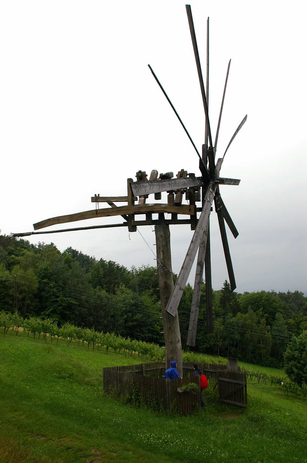 Klapotetz in Österreich